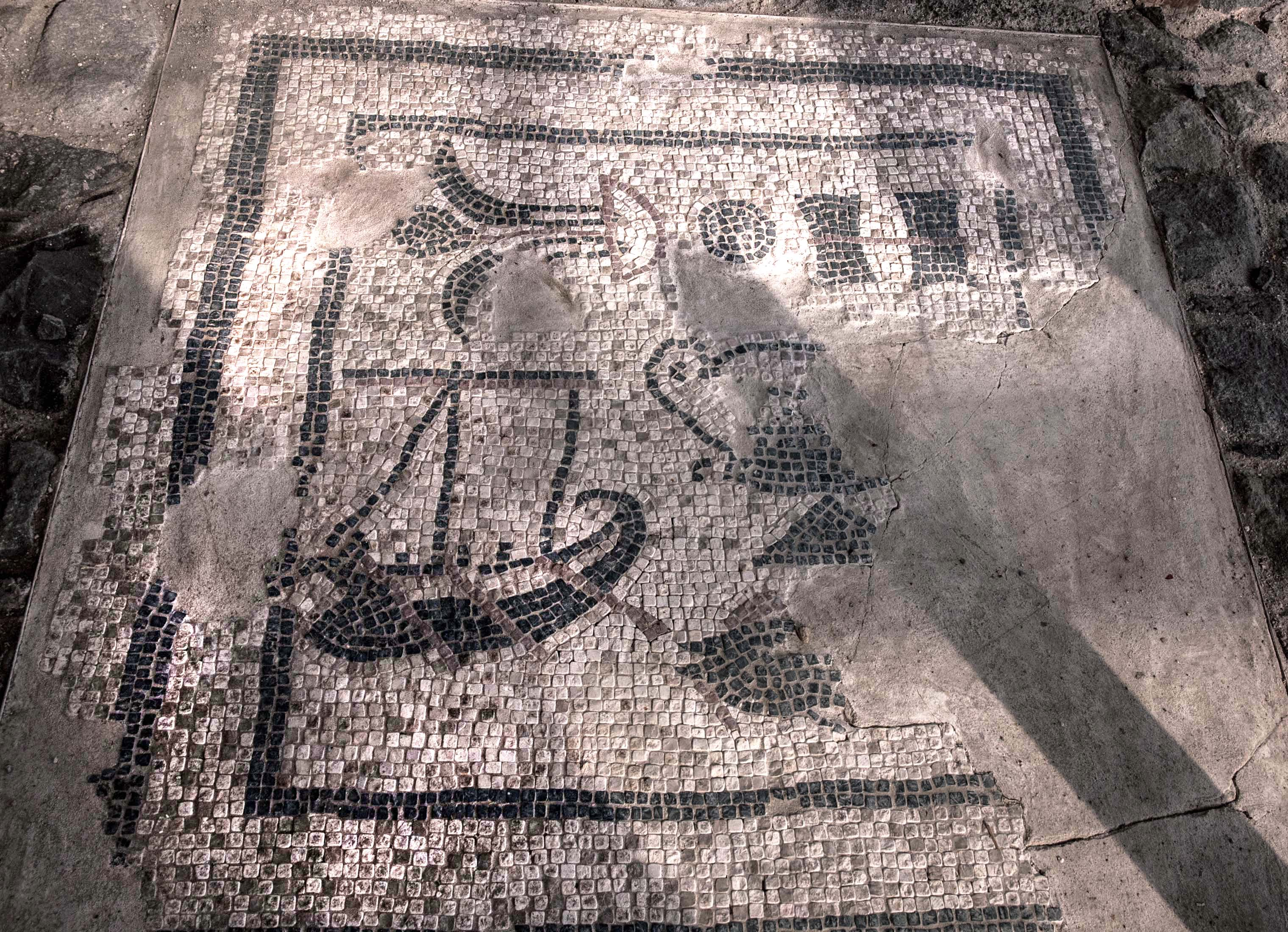 עיר קדומה בגליל, ששכנה לחוף הכנרת, בדרום בקעת גינוסר, סמוך ליישוב מגדל של היום המשמר את שמה. עד להקמת העיר טבריה בשנת 20 לספירה, הייתה מגדלא המרכז העירוני היחיד בחוף המערבי של הכנרת.